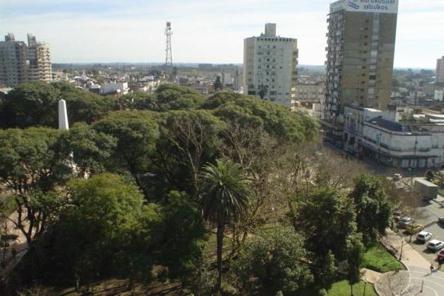 Plaza Ramirez de la ciudad de Concepcion del Uruguay